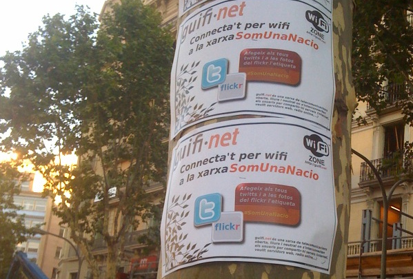 Cartell amb les indicacions sobre com connectar-se per wifi a la xarxa Somunanacio a la manifestació del 10 de juliol del 2010